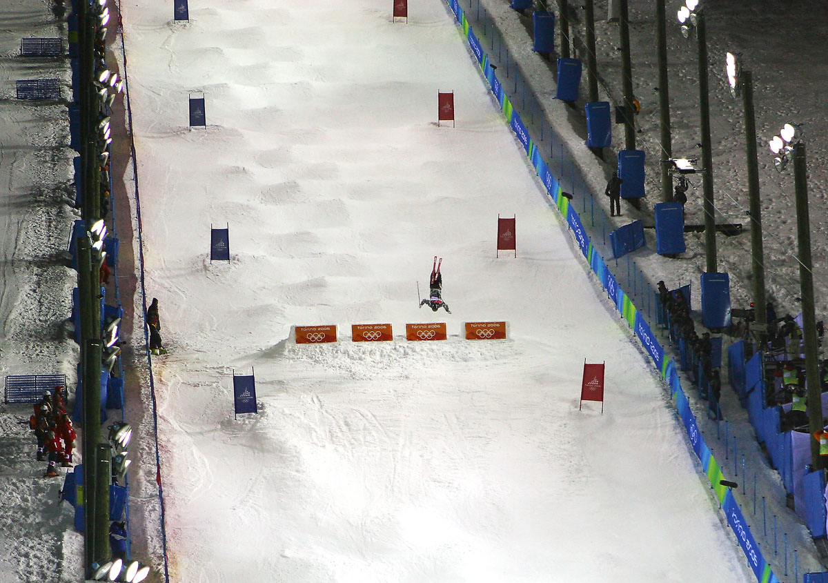 Ski acrobatique aux JO